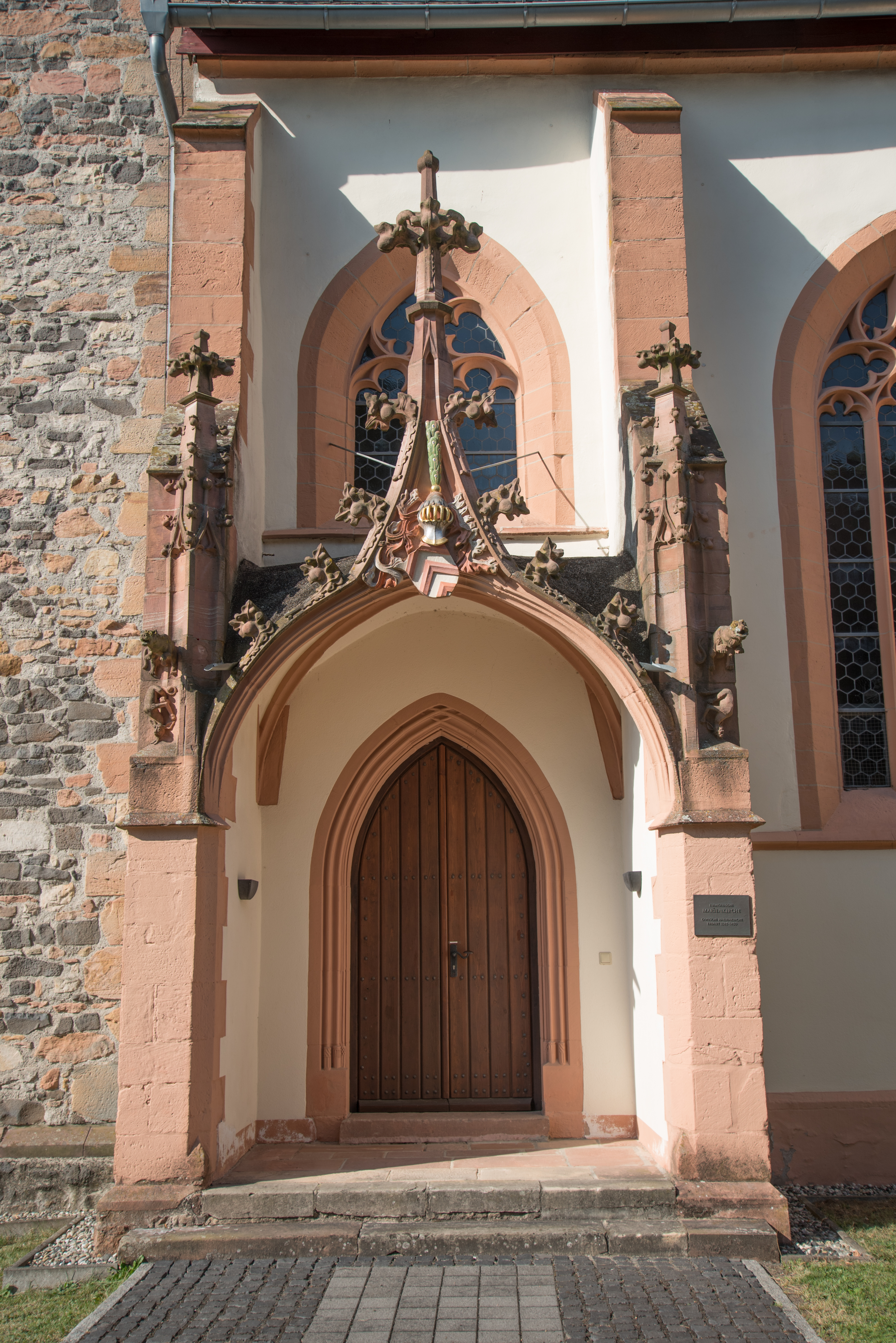 Ortenberg, Schloßplatz 4, Marienkirche